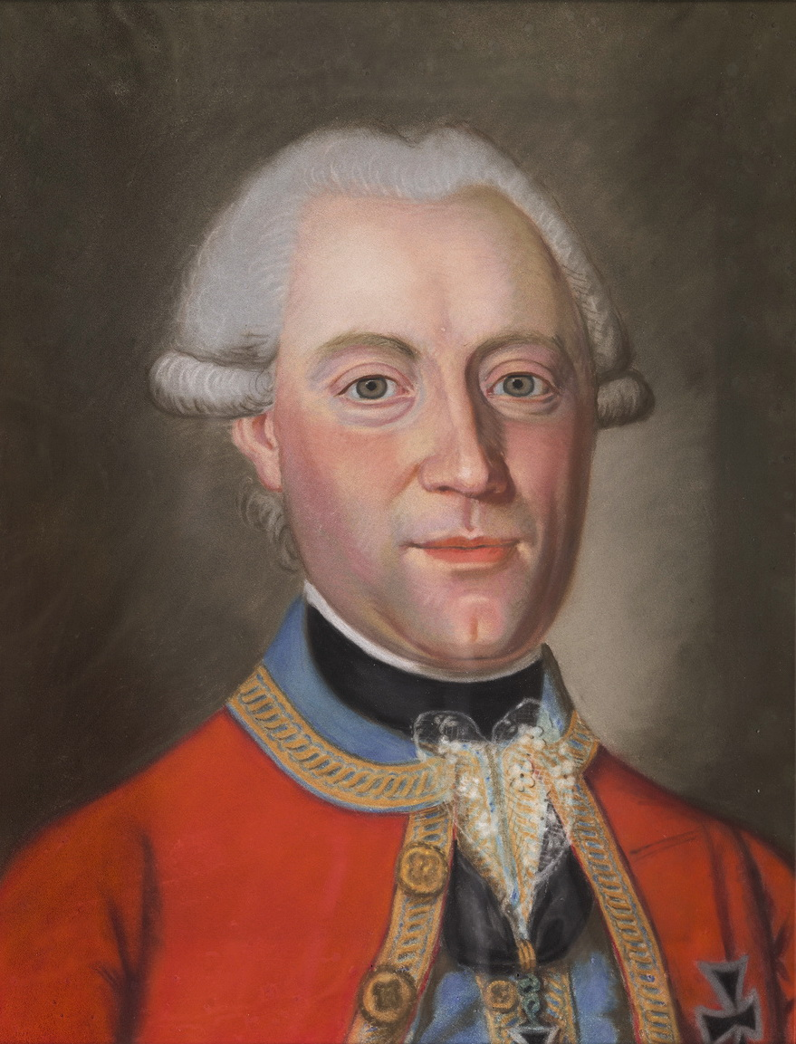 Heinrich Johann Droste zu Hülshoff, ein Onkel der Dichterin Annette von Droste-Hülshoff, war Deutschordensritter und General in Münster/Westfalen